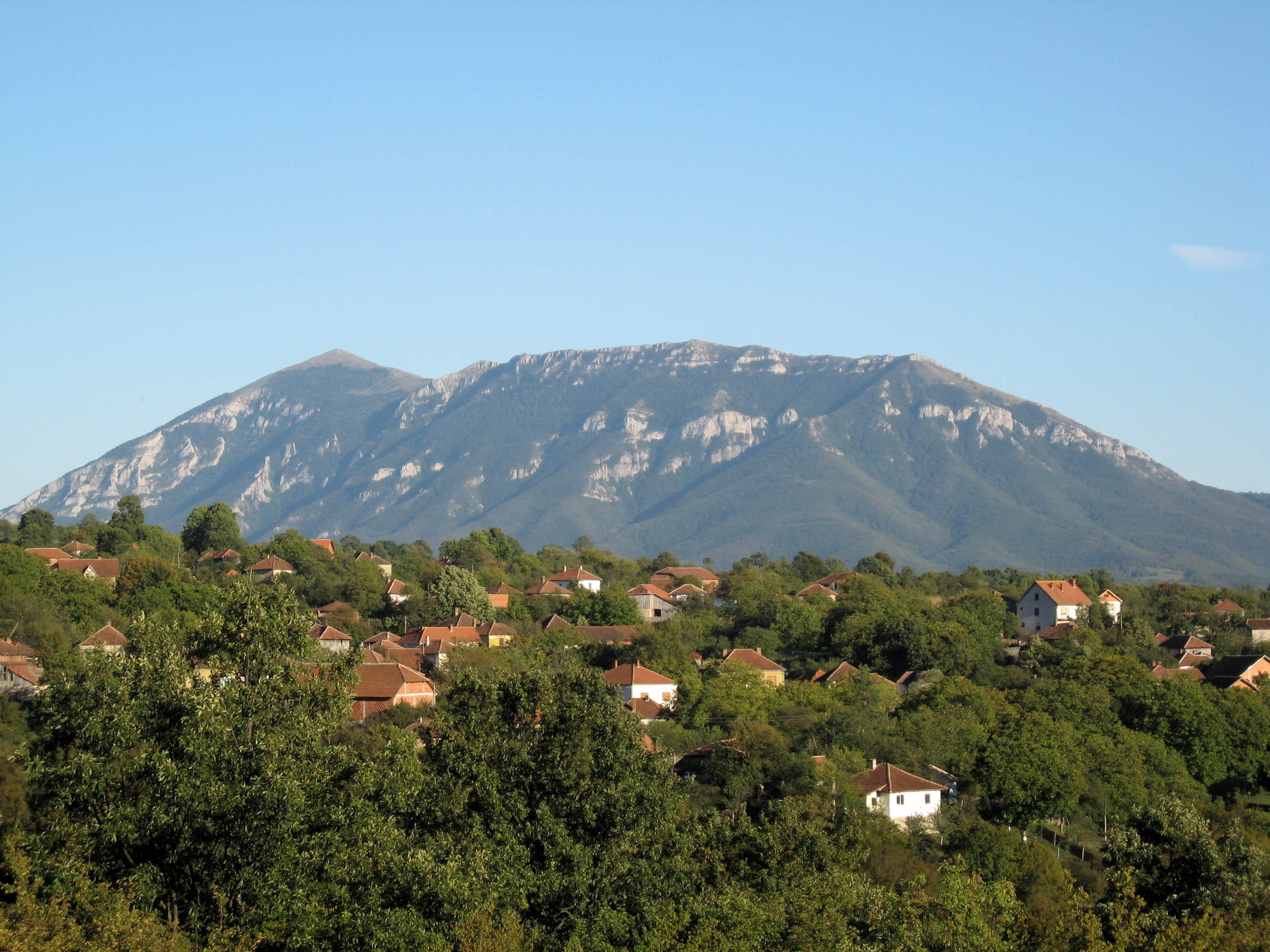 Криви Вир - поглед на село